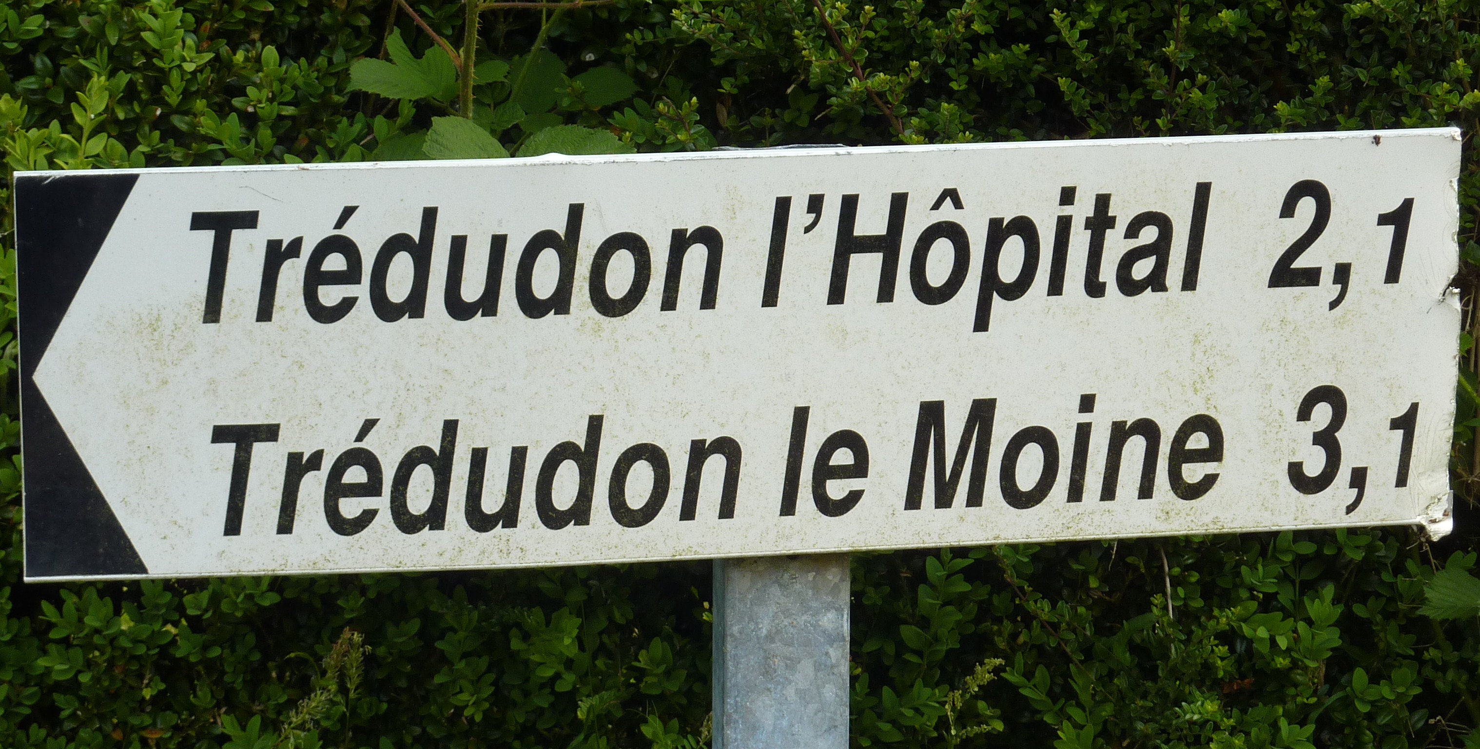 Les deux Trédudon, l'un en La Feuillée, l'autre en Berrien